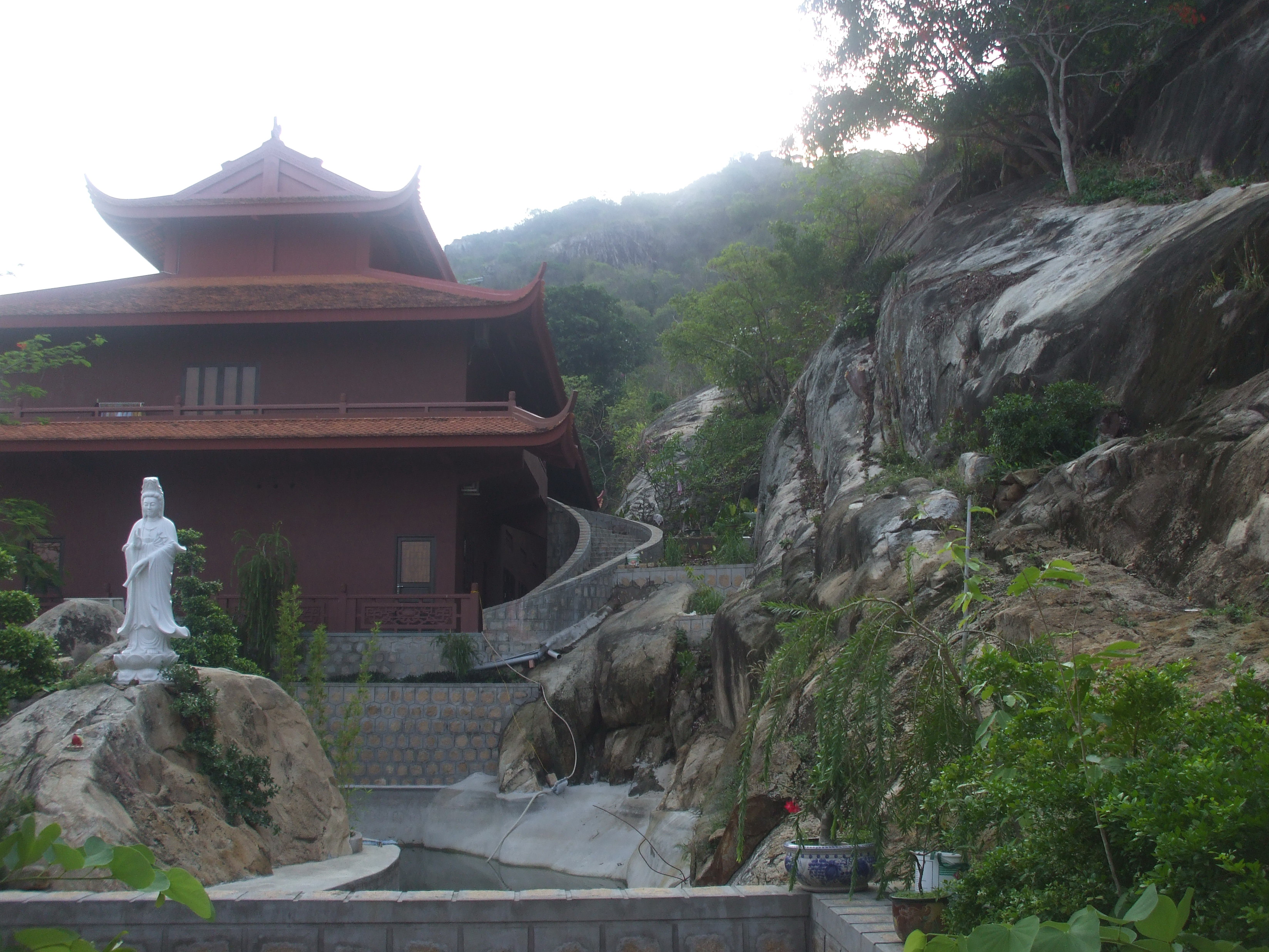 Chùa Hang nhỏ (Núi Sam, Châu Đốc), nơi tu học của các tu sĩ Phật giáo.